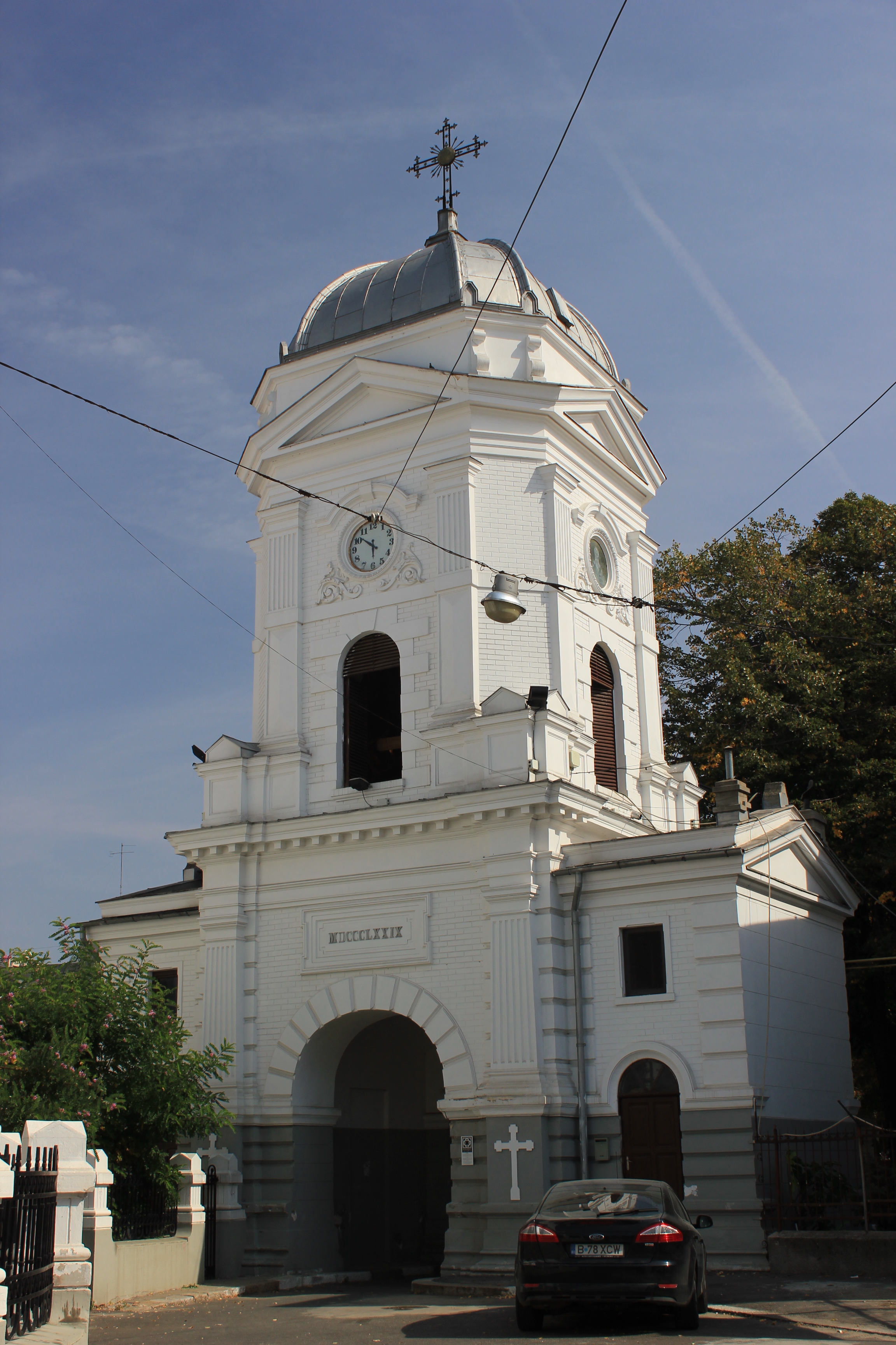 Biserica Sf Silvestru - Turnul cu Ceas 02